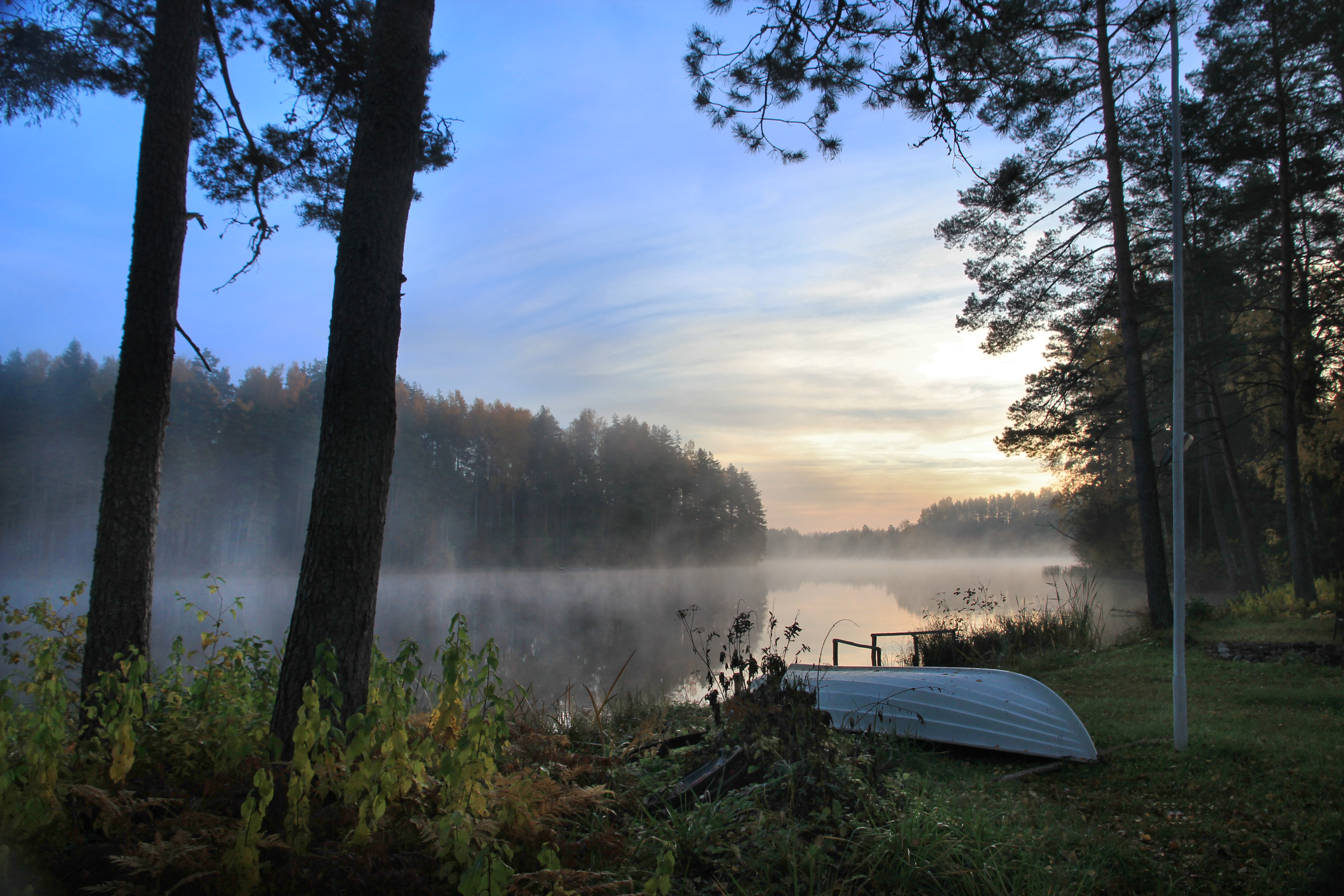 Suur Saarjärv paadiga